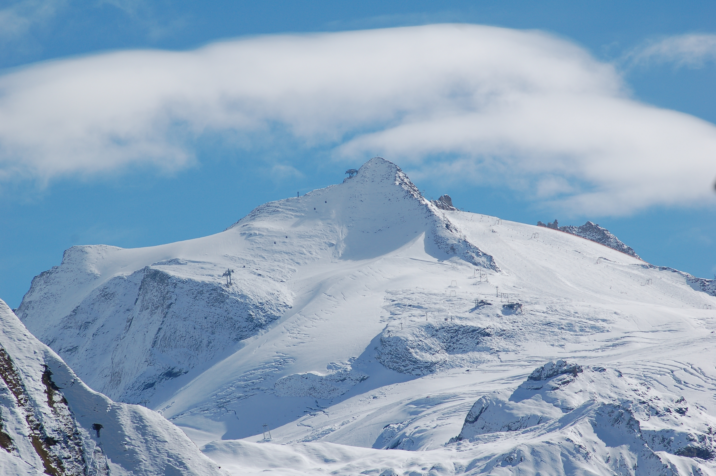 Zentral der Nordgipfel der Gefrorenen-Wand-Spitzen mit dem Gefrorenen-Wand-Kees (Hintertuxer Gletscher), gesehen vom Hang des Durrachjöchls in Schmirn.